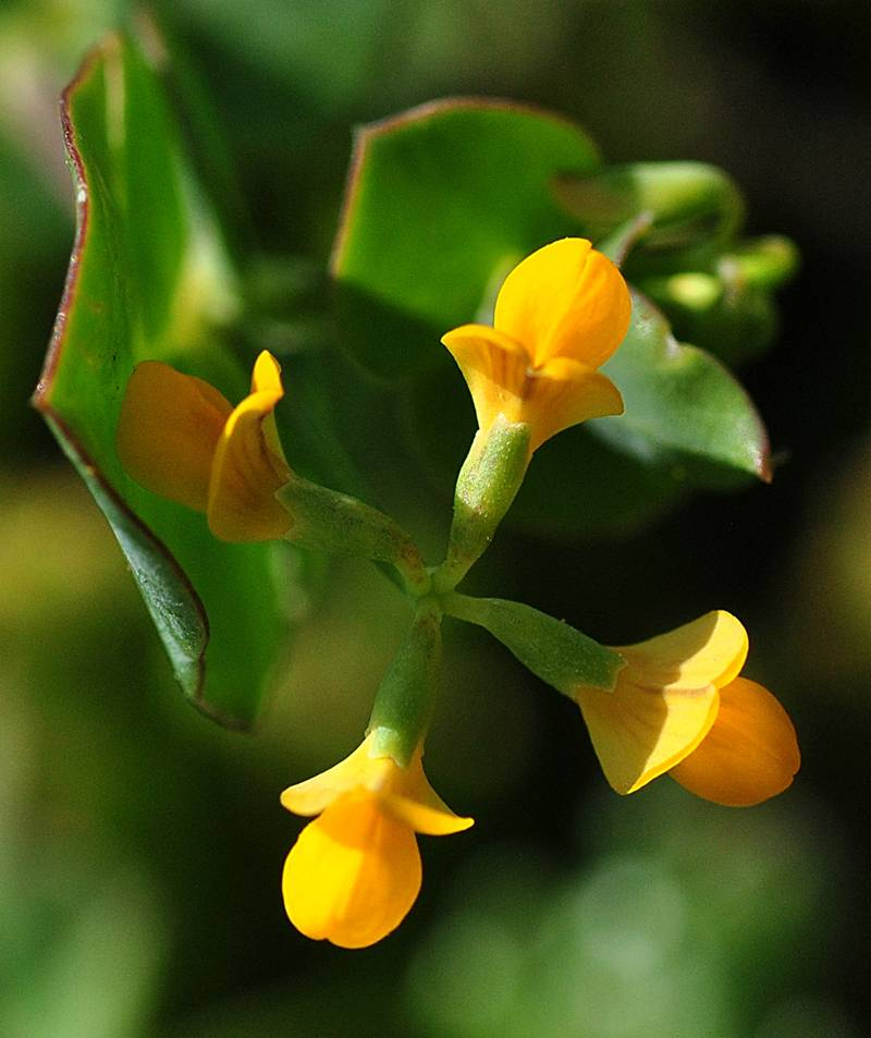 Coronills scorpioides